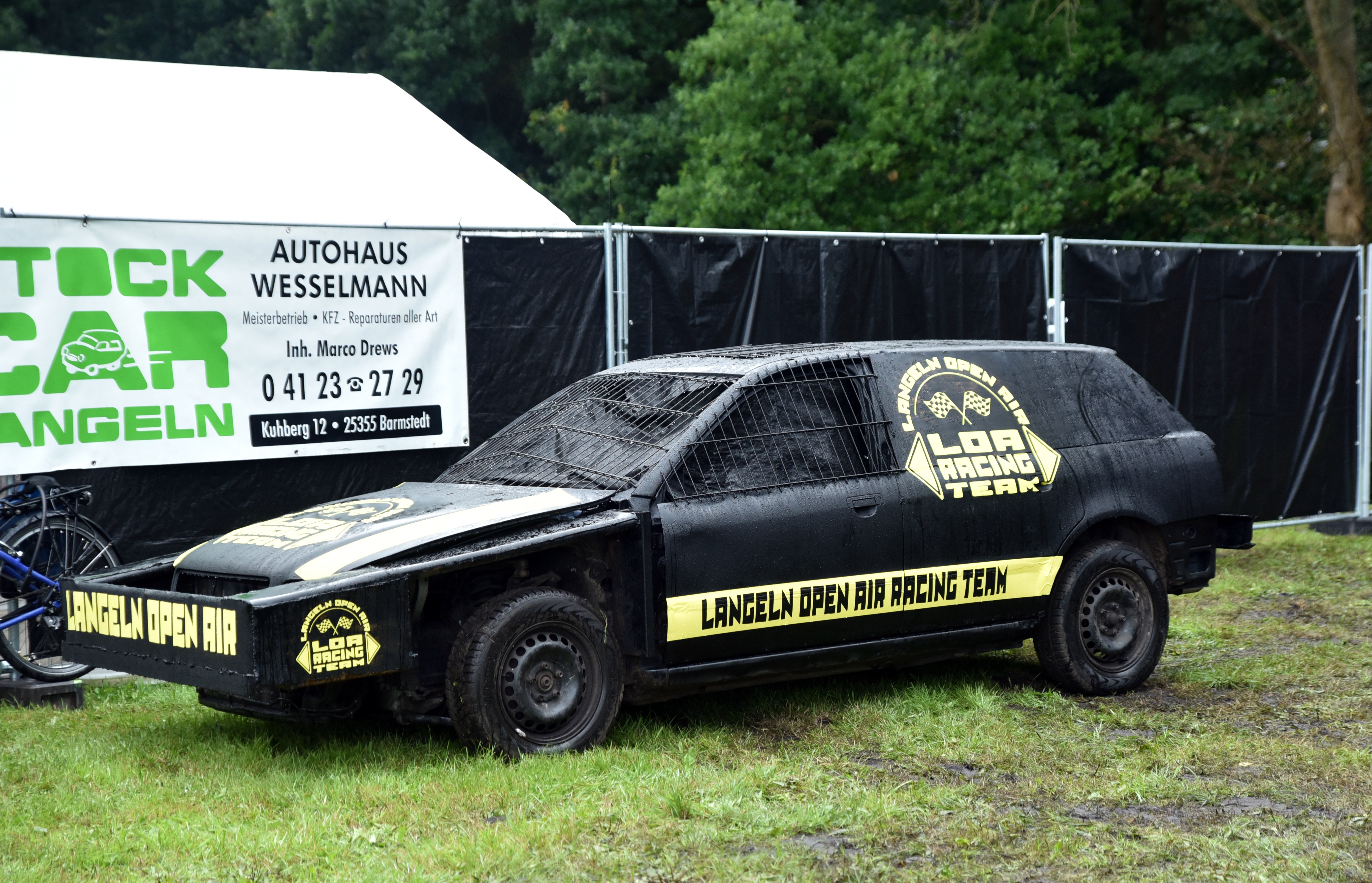 Stock Car beim Langeln Open Air 2016